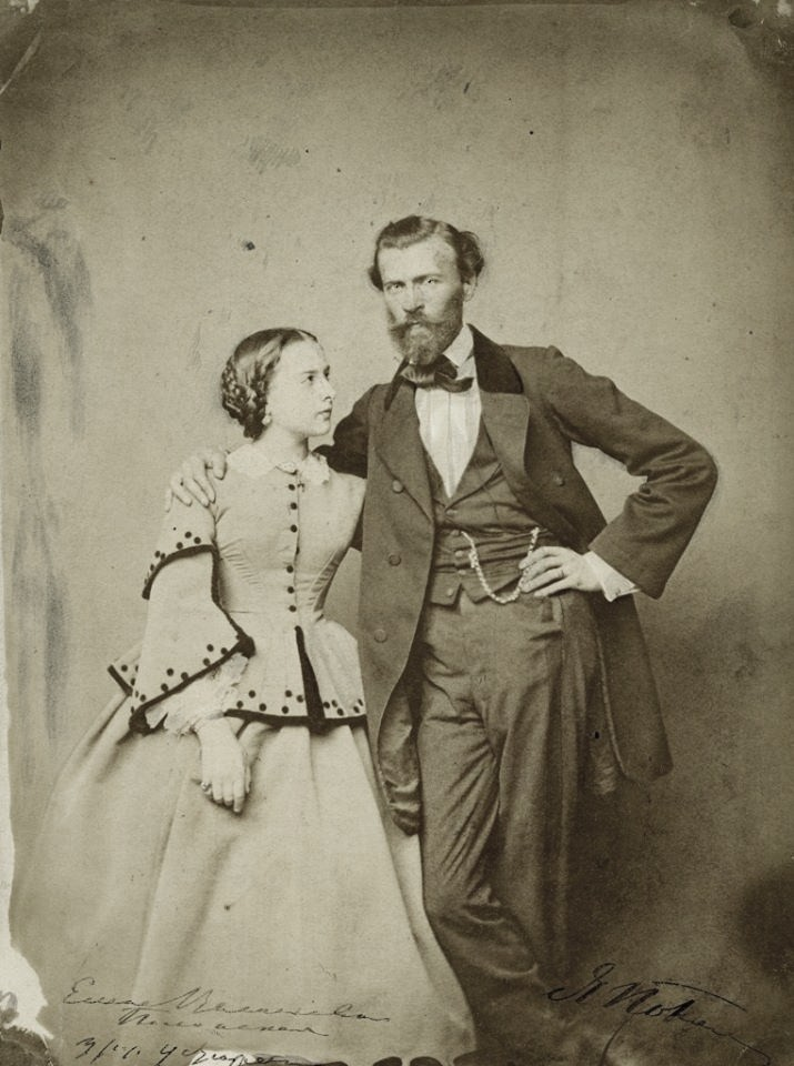 Яков Полонский с первой женой Еленой Васильевной.